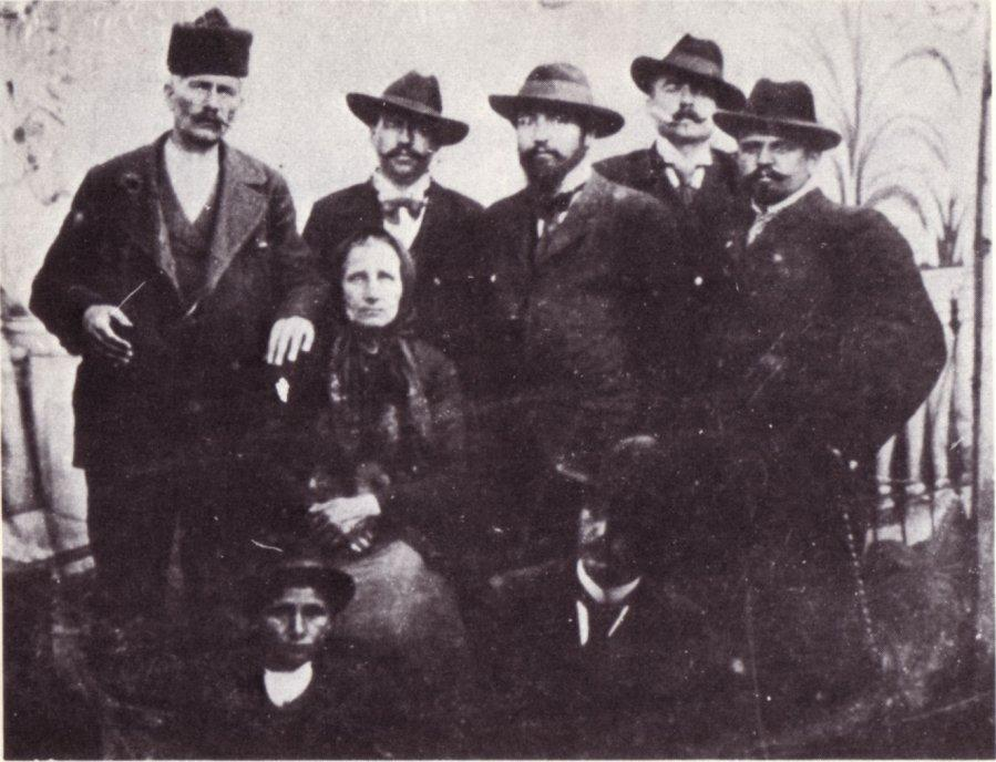 Марко Секулички, Гоце Делчев, Михаил Герджиков, Петко Пенчев и баба Дона Ковачева, Кюстендил, 1902